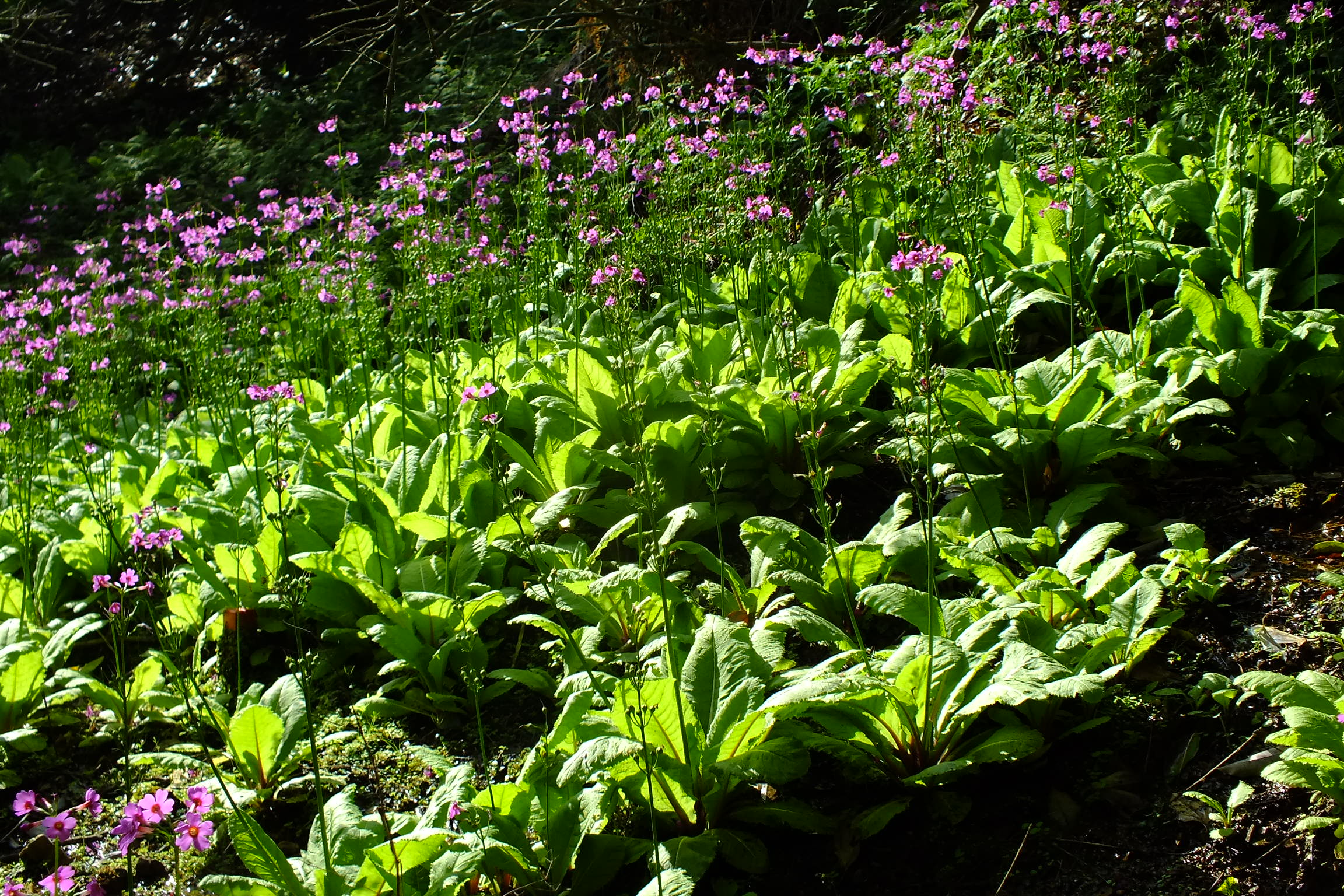 2016-05-17 Primula japonica in Mt.Mitke,Sasayama (クリンソウ,九輪草) 兵庫県篠山市 御嶽山麓